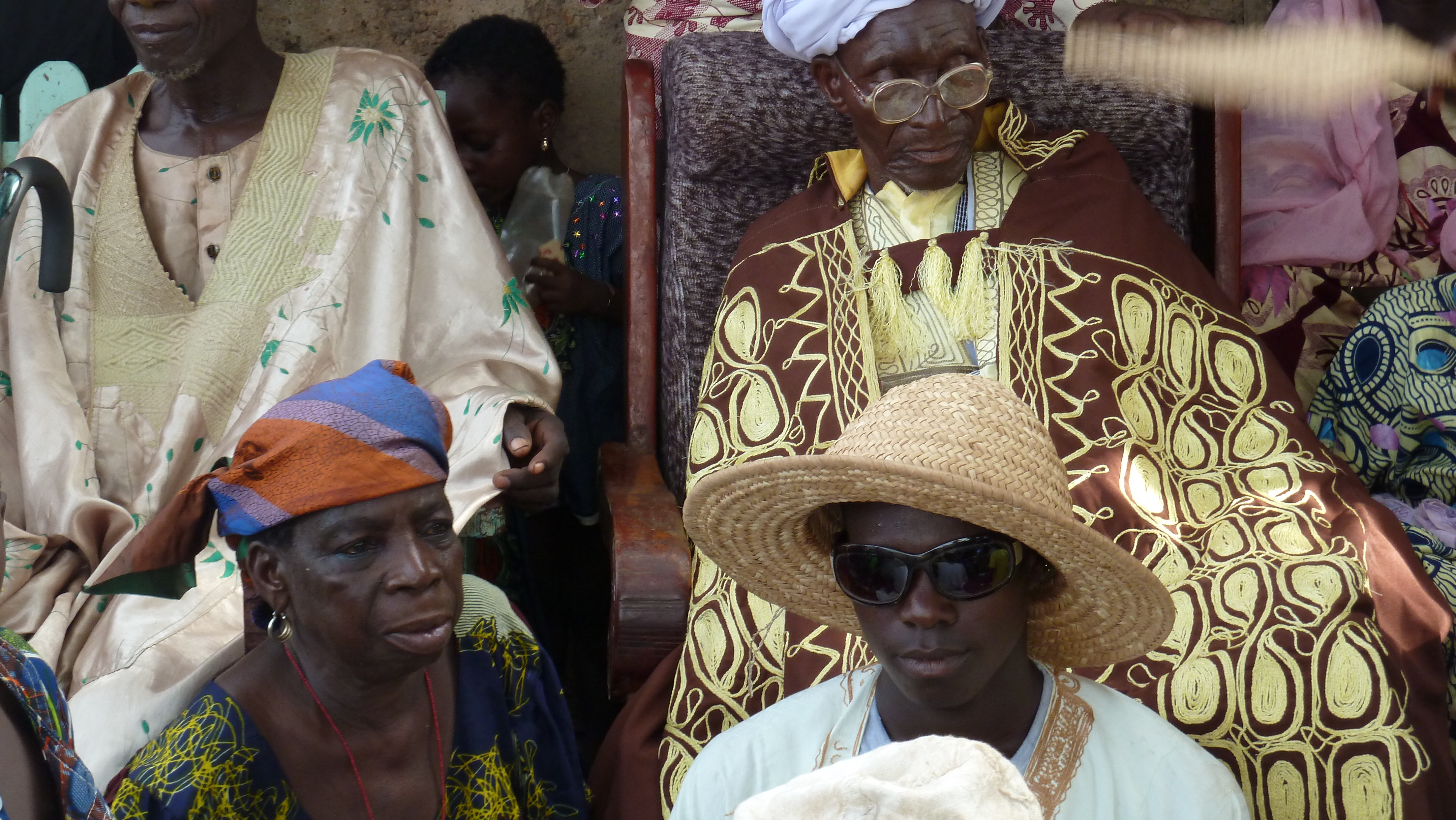 Roi du village de komiguéa à la cérémonie This is an image of Cultural Fashion or Adornment from Benin